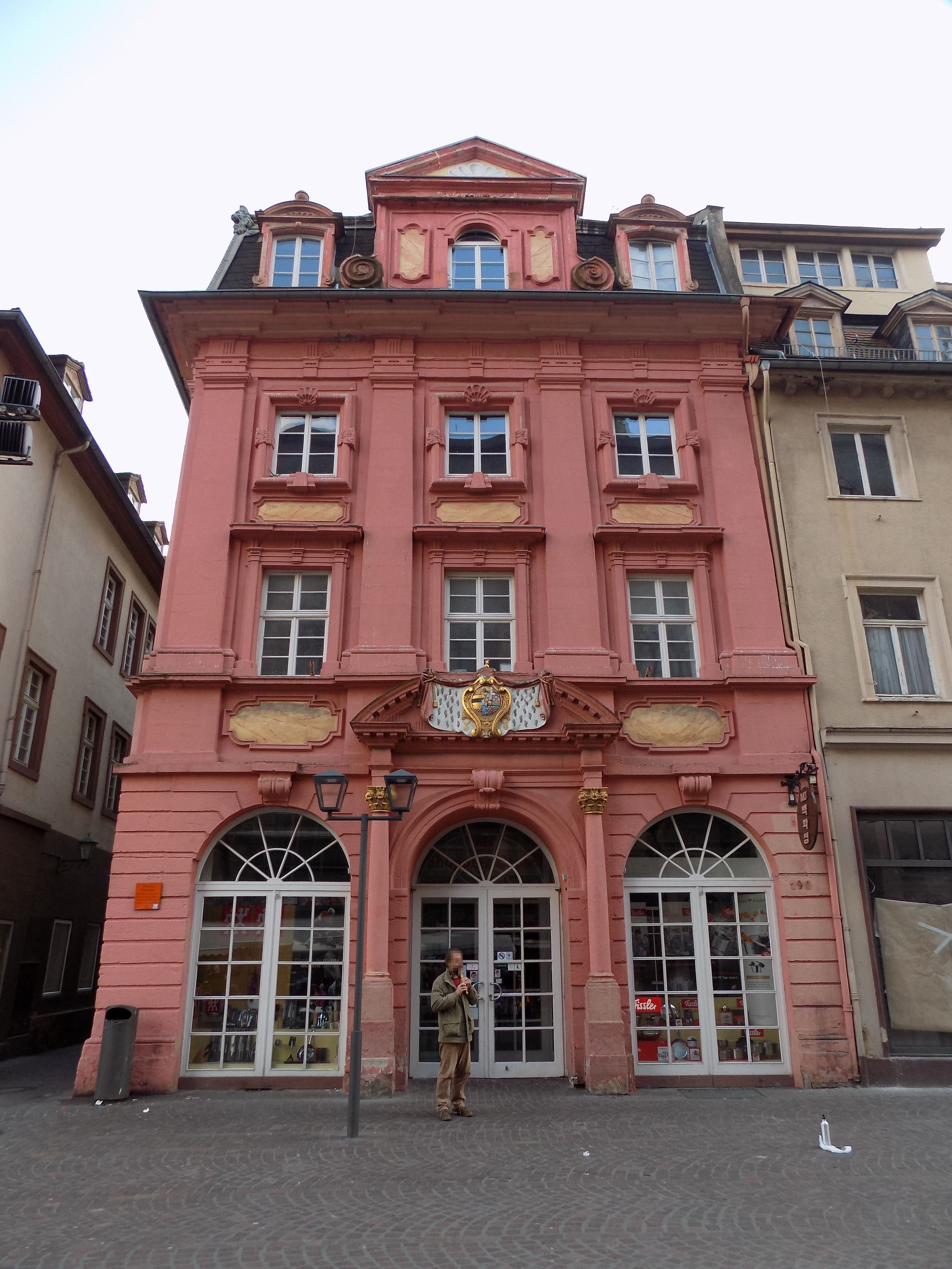 Hofapotheke Heidelberg neue Version ohne Mc Donalds